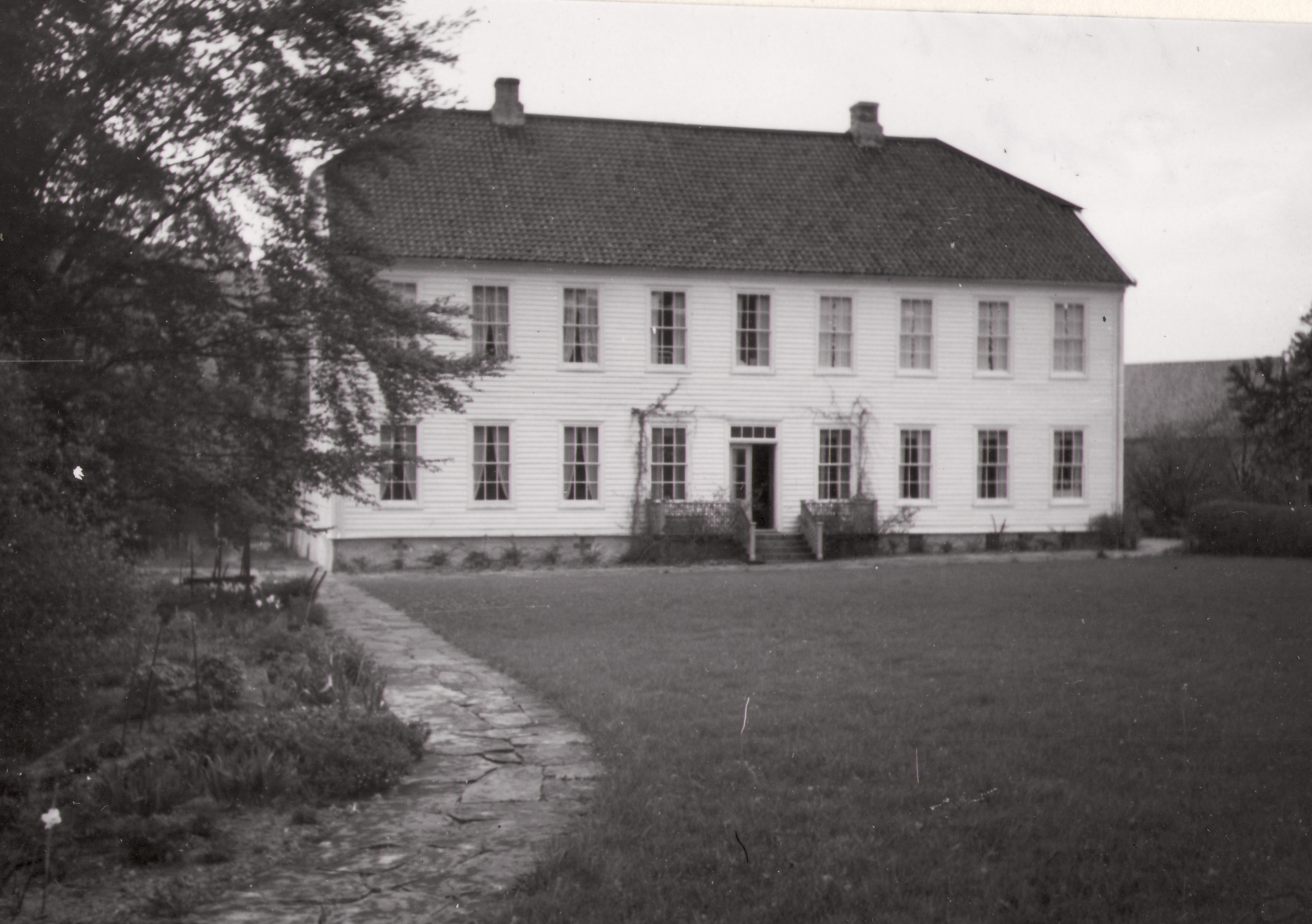 Boen i Tveit, Vest-Agder This image on crowdsourcing geotagging platform Fotodugnad